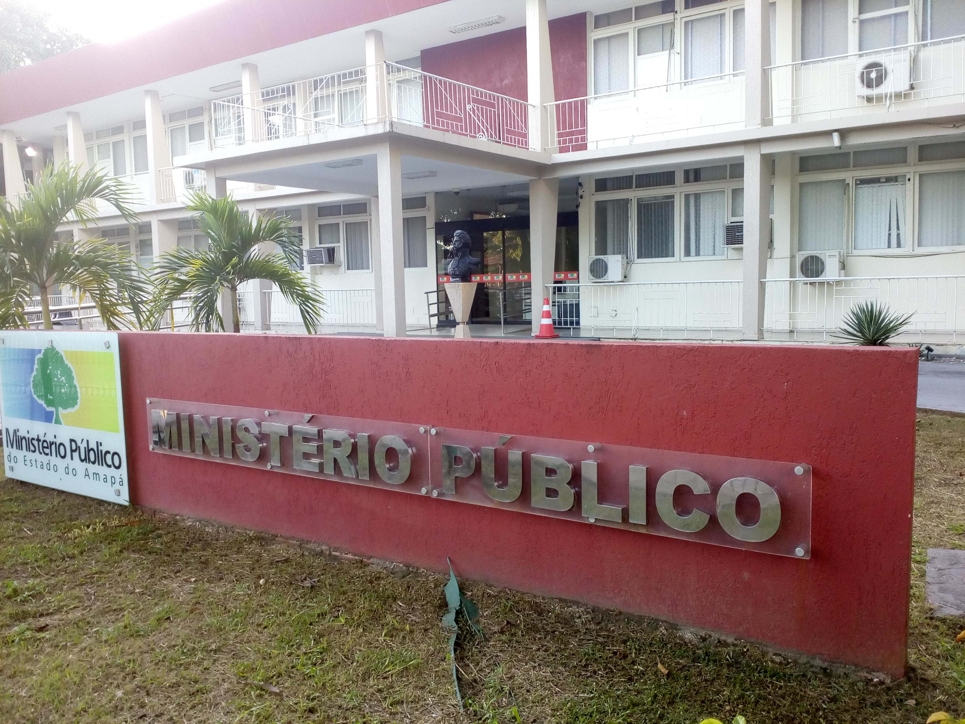 Sede do Ministério Público do Estado do Amapá, 2018.